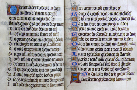 15de-eeuws handschrift, met op opengeslagen rechterbladzijde een gedicht van Anthonis de Roovere getekend met een acrostichon, van onder tot boven te lezen.